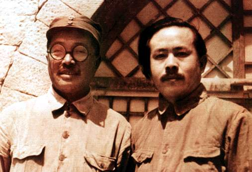 1945年，中共七大期间贺龙与任弼时在一起